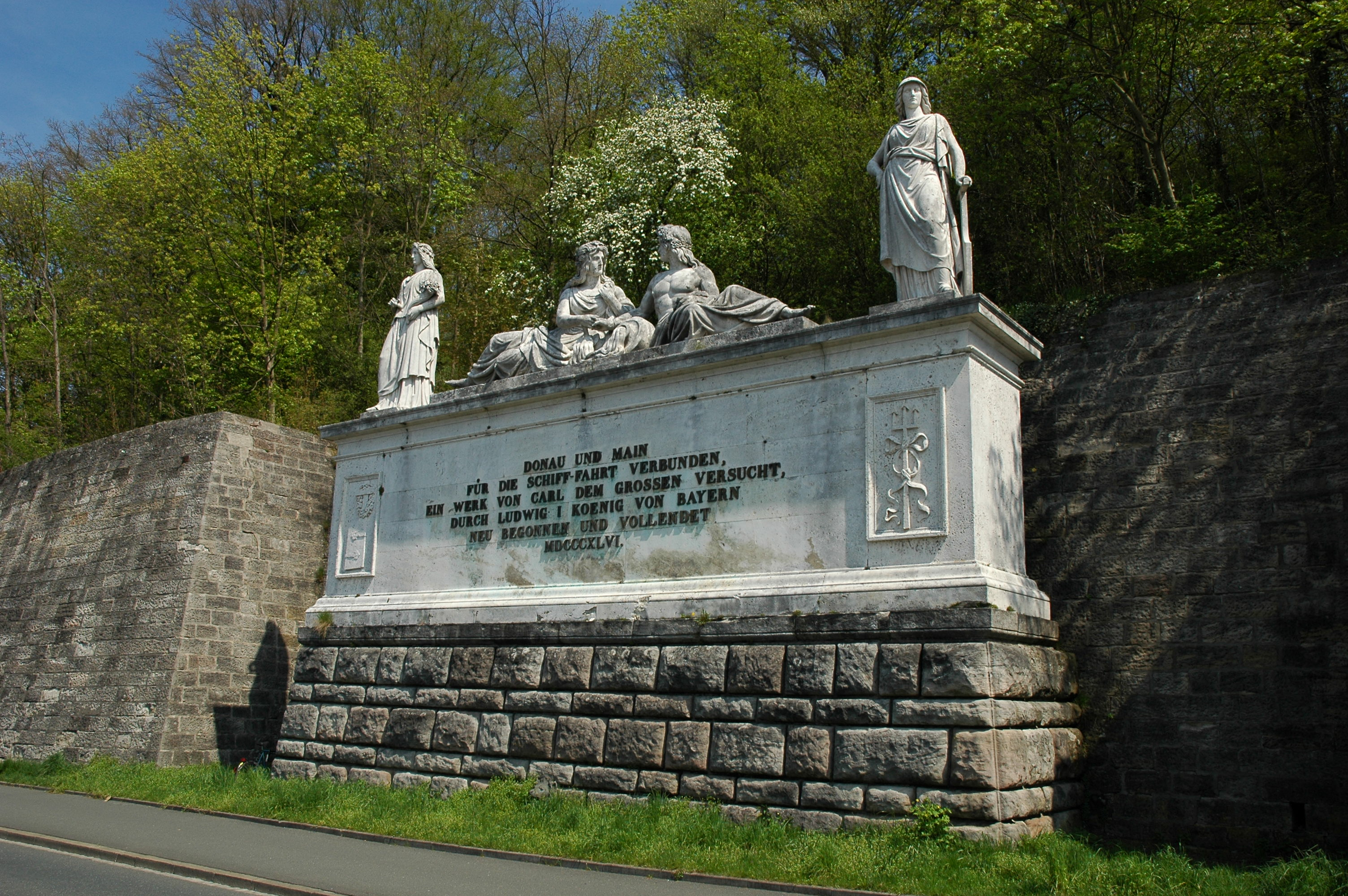 Ludwigskanaldenkmal bei Erlangen